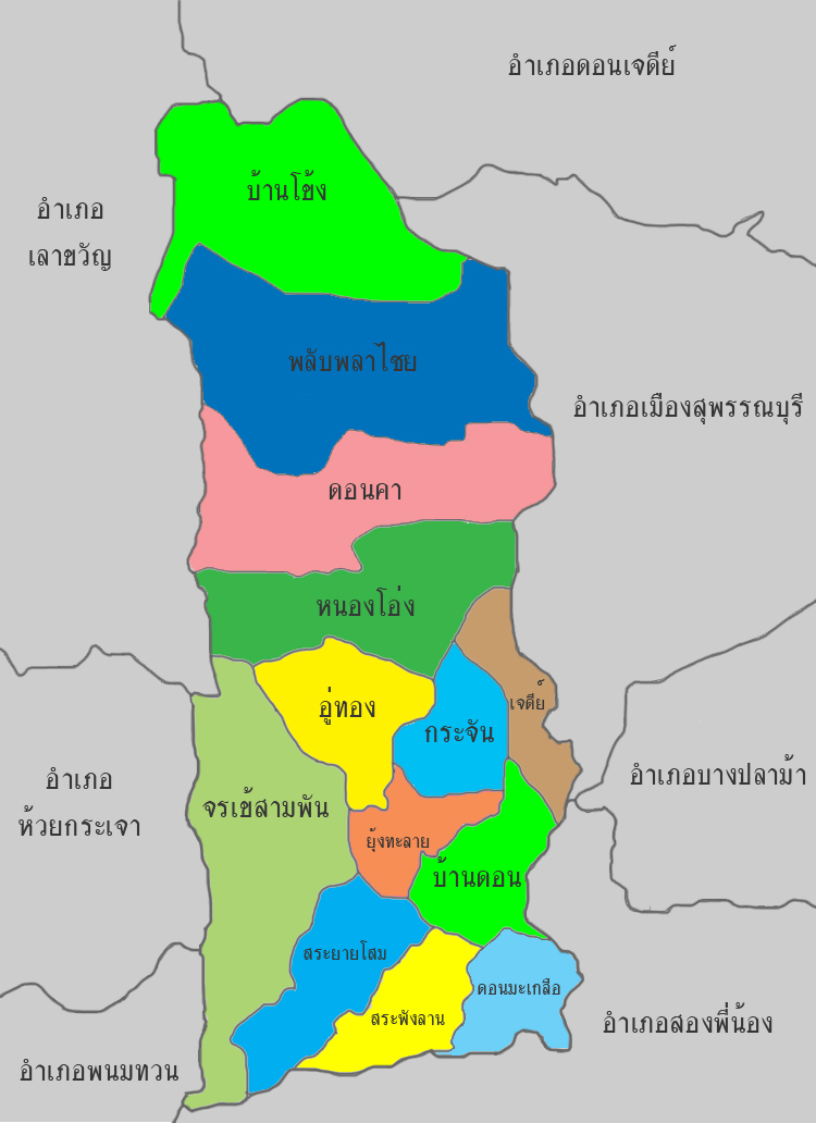 แผนที่แสดงเขตตำบลในอำเภออู่ทอง และเขตติดต่อ U-Thong district.